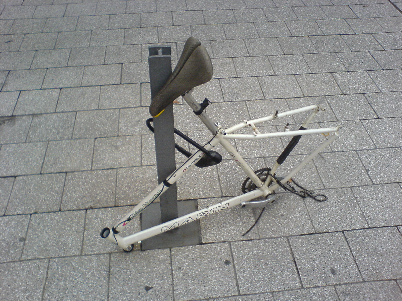 Ausgeschlachtetes Fahrrad (cannibalised bike)